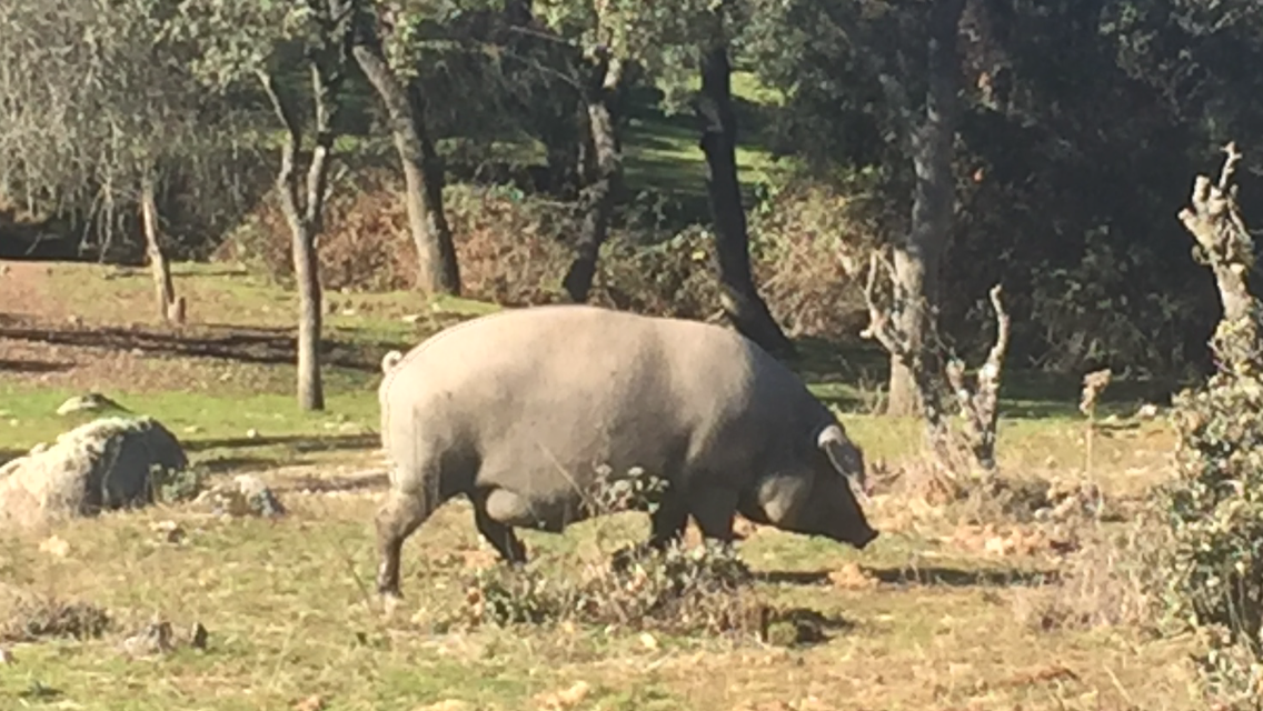 Un cerdo 100% Ibérico en la región del Alentejo (Portugal). En una finca de BEHER Bernardo Hernández.